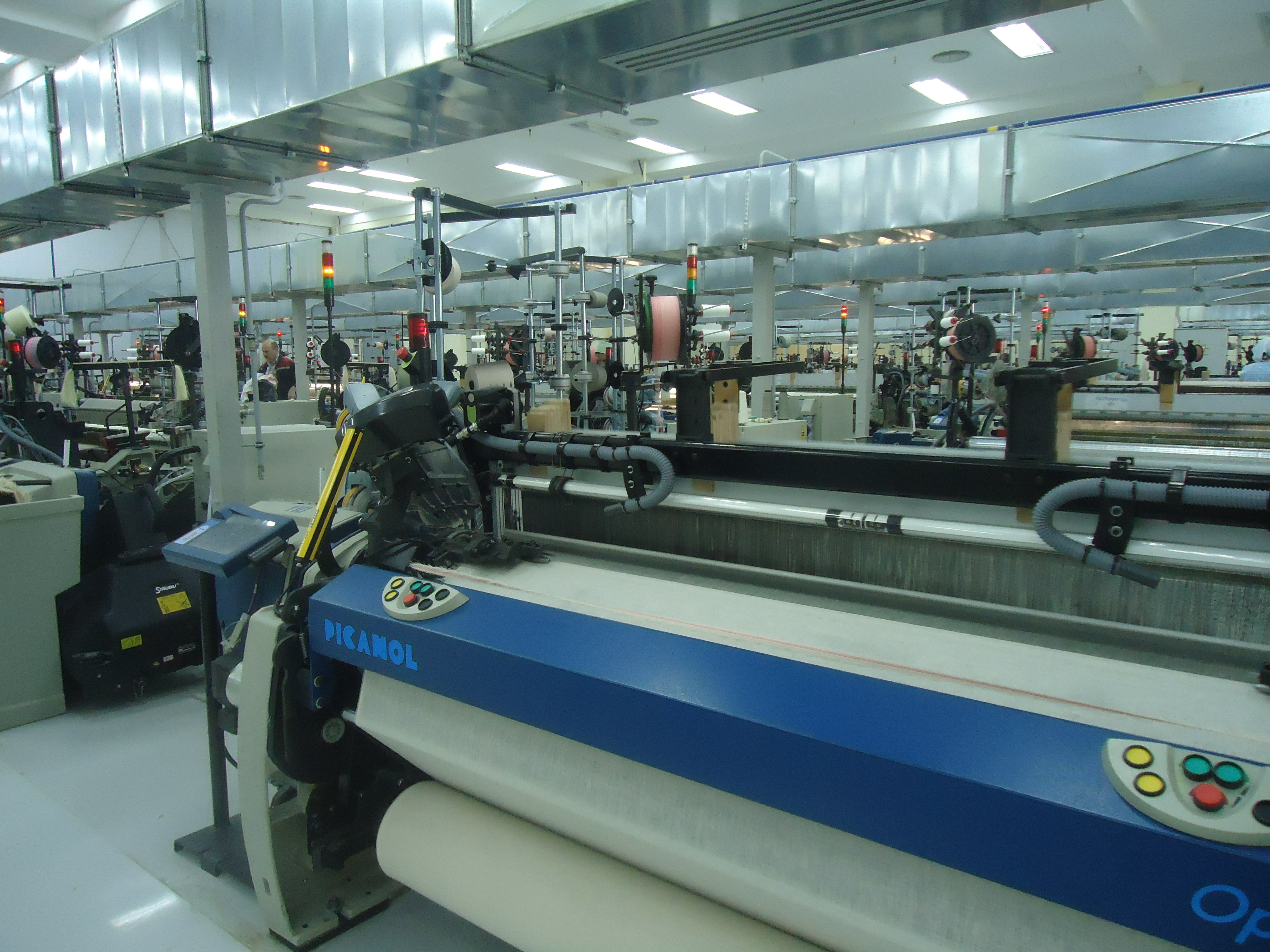 Пиканоль. В цехах льнокомбината г. Оршанск, Витебская область Тоҷикӣ: Дастгоҳҳои комбинати матои зағир дар ш. Оршанск, Вилояти Витебск